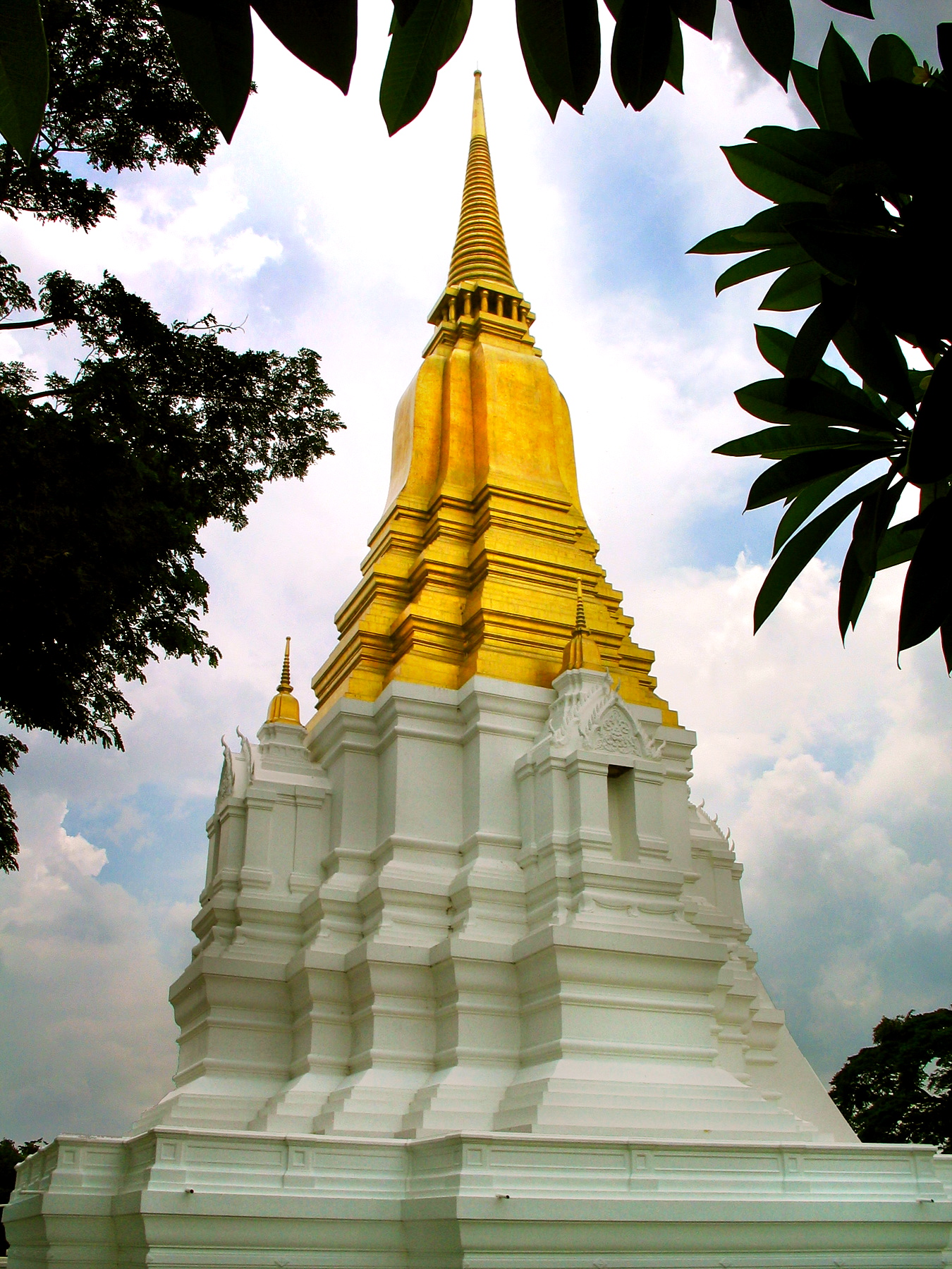 Chedi Sri Suriyothai, Ayutthaya, Thailand.